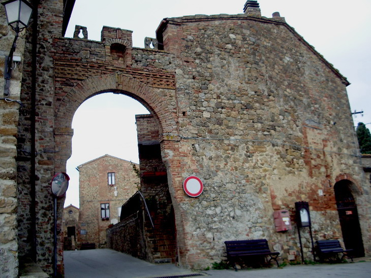 La Porta lungo le Mura di Porrona (GR)